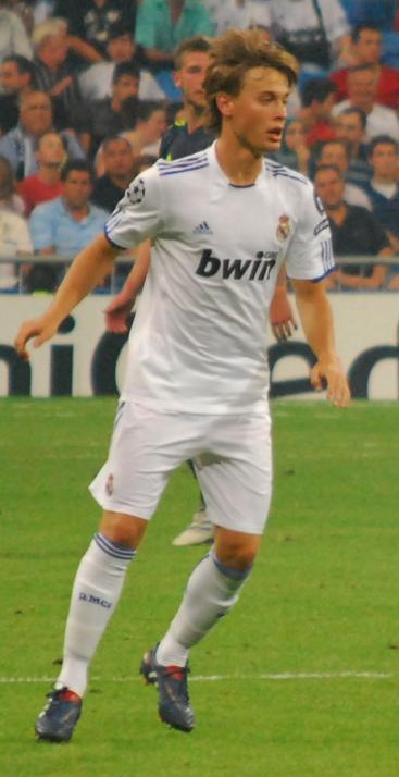 Primer partido de la Champions Legue Real Madrid 2 - Ajax 0 15 septiembre 2010